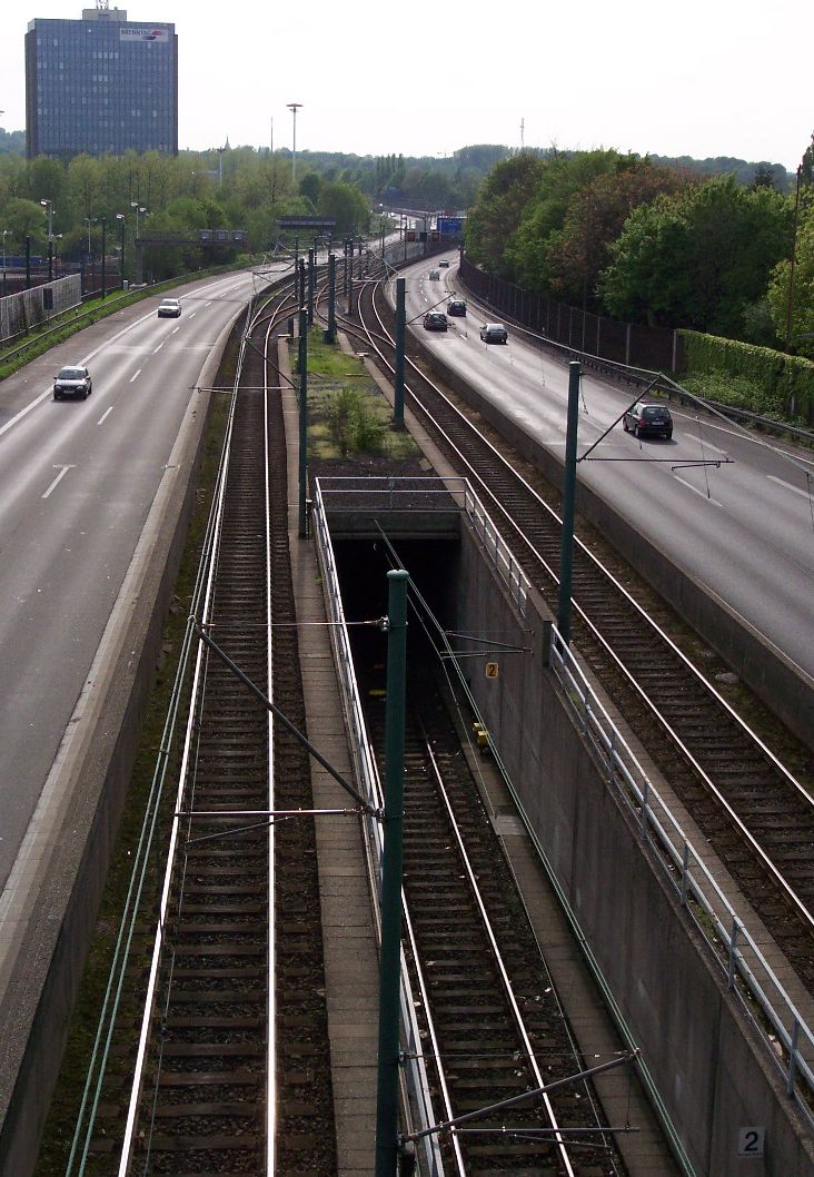 Essen, Stadtbahn-Modellstrecke im Mittelstreifen des Ruhrschnellweges zwischen Essen und Mülheim vom Bahnhof Wickenburgstraße Richtung Westen, das nach unten führende Gleis ist die Anbindung des Betriebshofes Schweriner Straße. Im Hintergrund liegen eine Kehranlage und der Hp Rhein-Ruhr-Zentrum. eigenes Bild